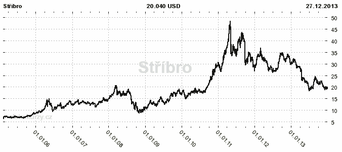 Stříbro - graf vývoje ceny investičního stříbra v USD/oz